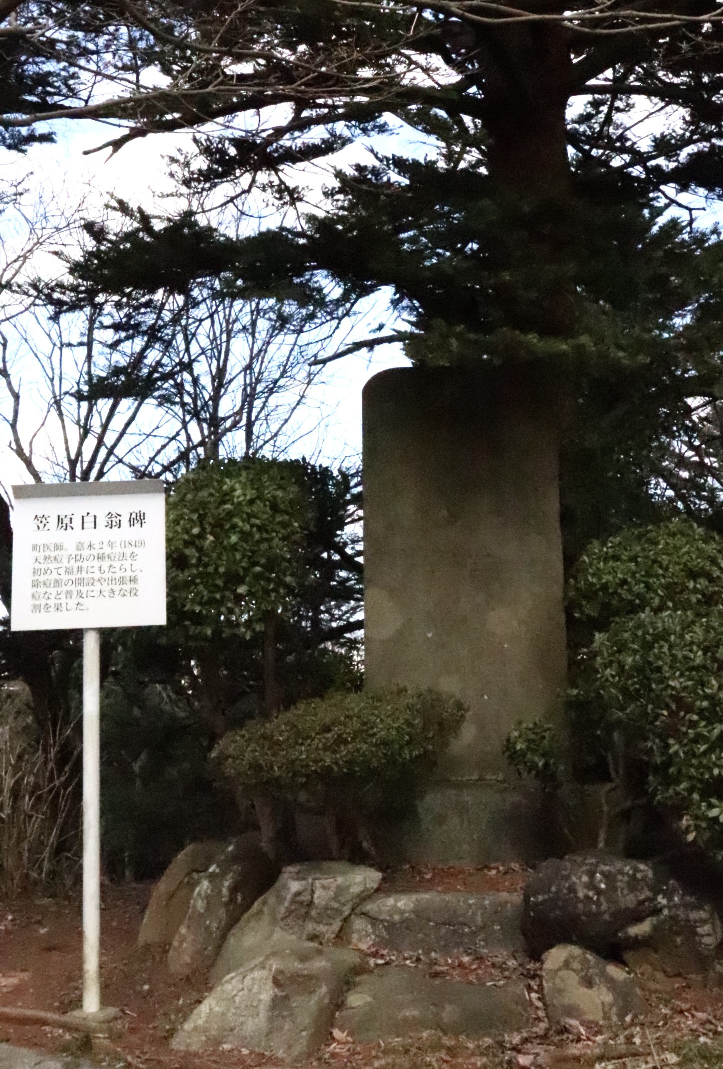 篆額は山階宮。碑文は川田剛。福井市自然史博物館横の通称「三段広場」にある。明治27年8月門人たちが建立。主唱者は大武又玄、水野行敏、安藤精軒。